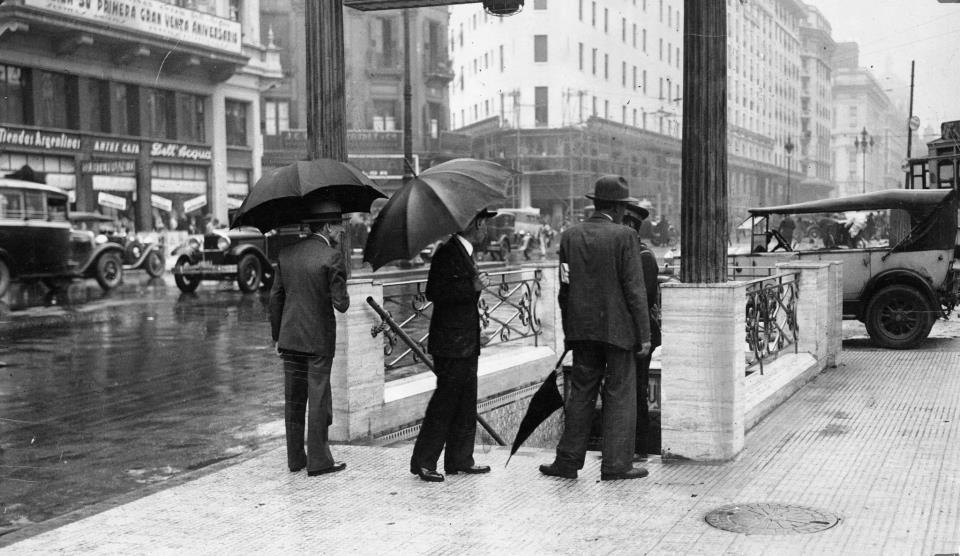 Boca de acceso a la estación Diagonal Norte del subterráneo CHADOPYF, hoy linea C del Subte de Buenos Aires. Al fondo, en construcción, el Edificio Pini.